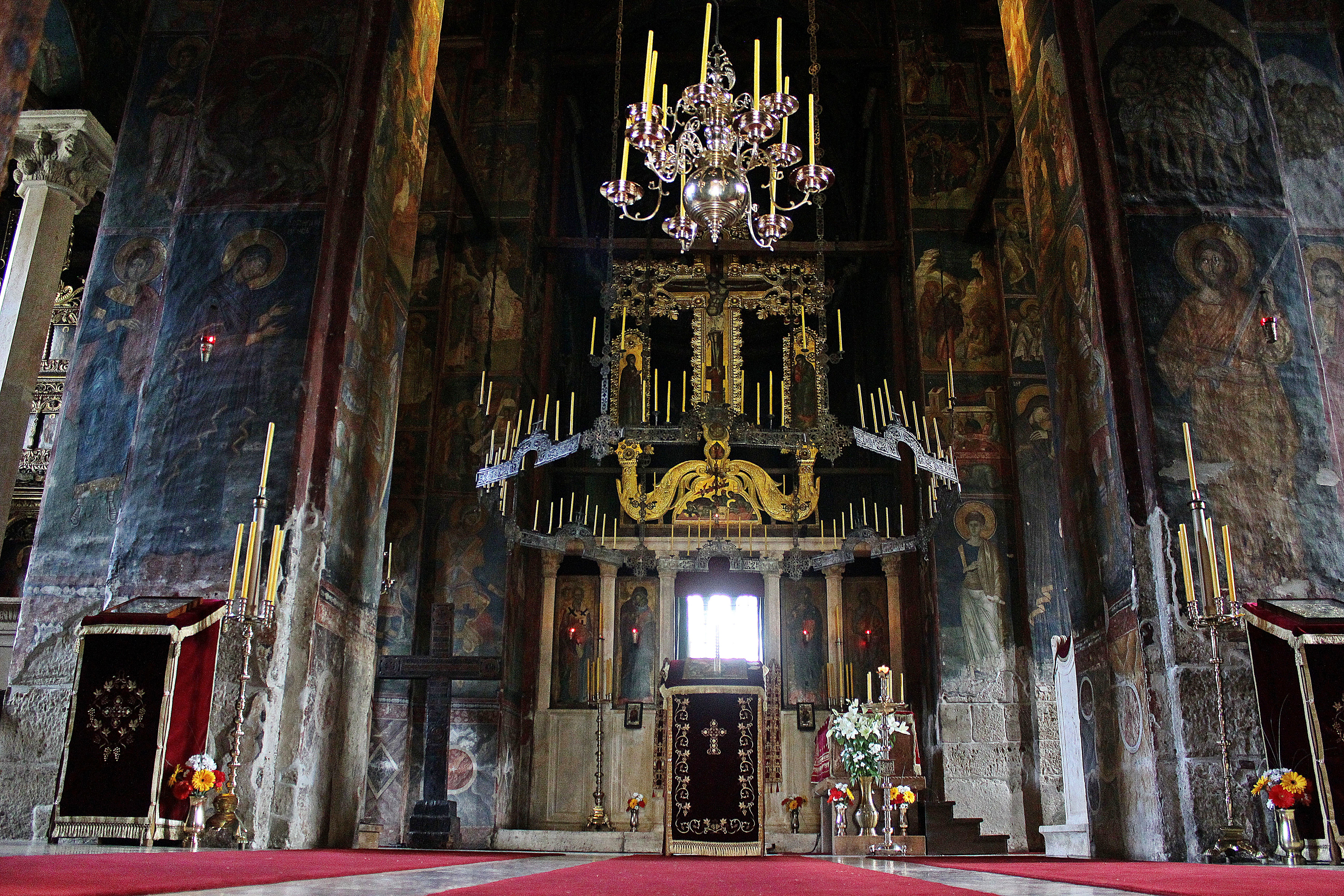 Manastiri i Deçanit